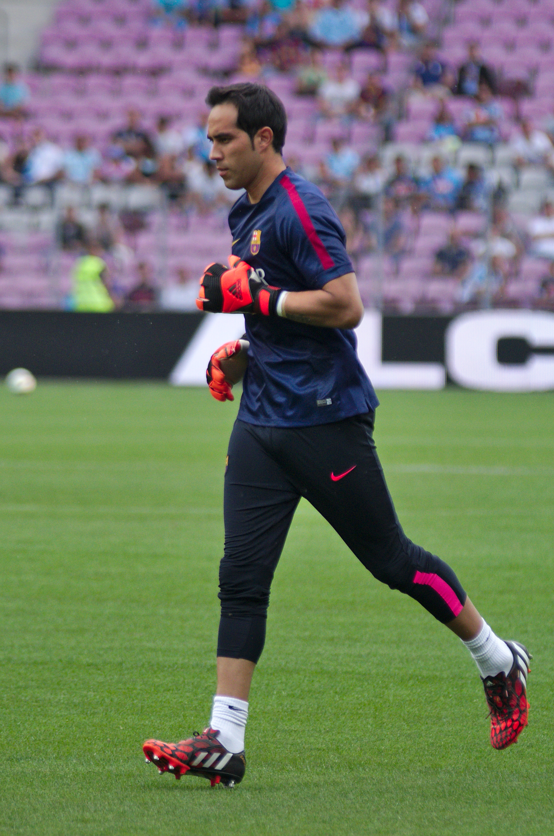 Barça - Napoli - 20140806 - Claudio Bravo